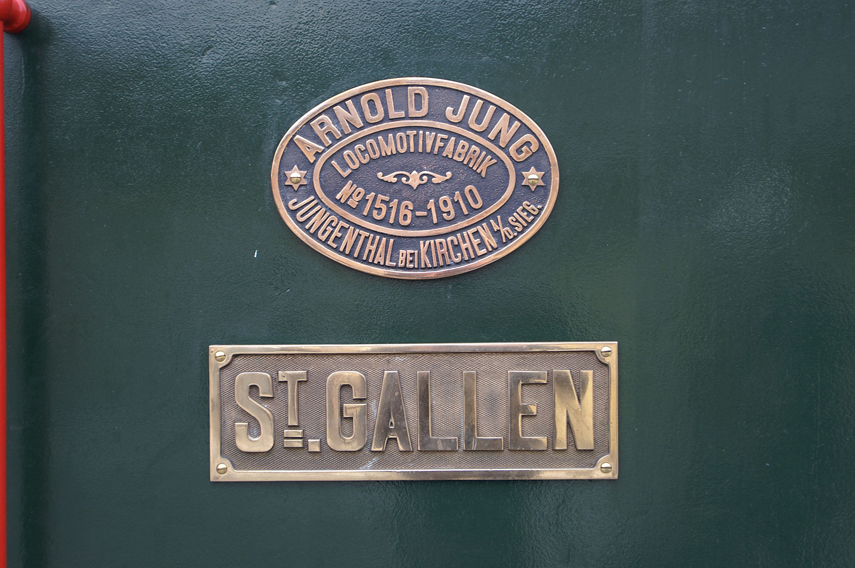 Arnold Jung Lokomotivfabrik Firmenplakette auf einer Dampflok im Dienste der Internationalen Rheinregulierung, stationiert in Lustenau.